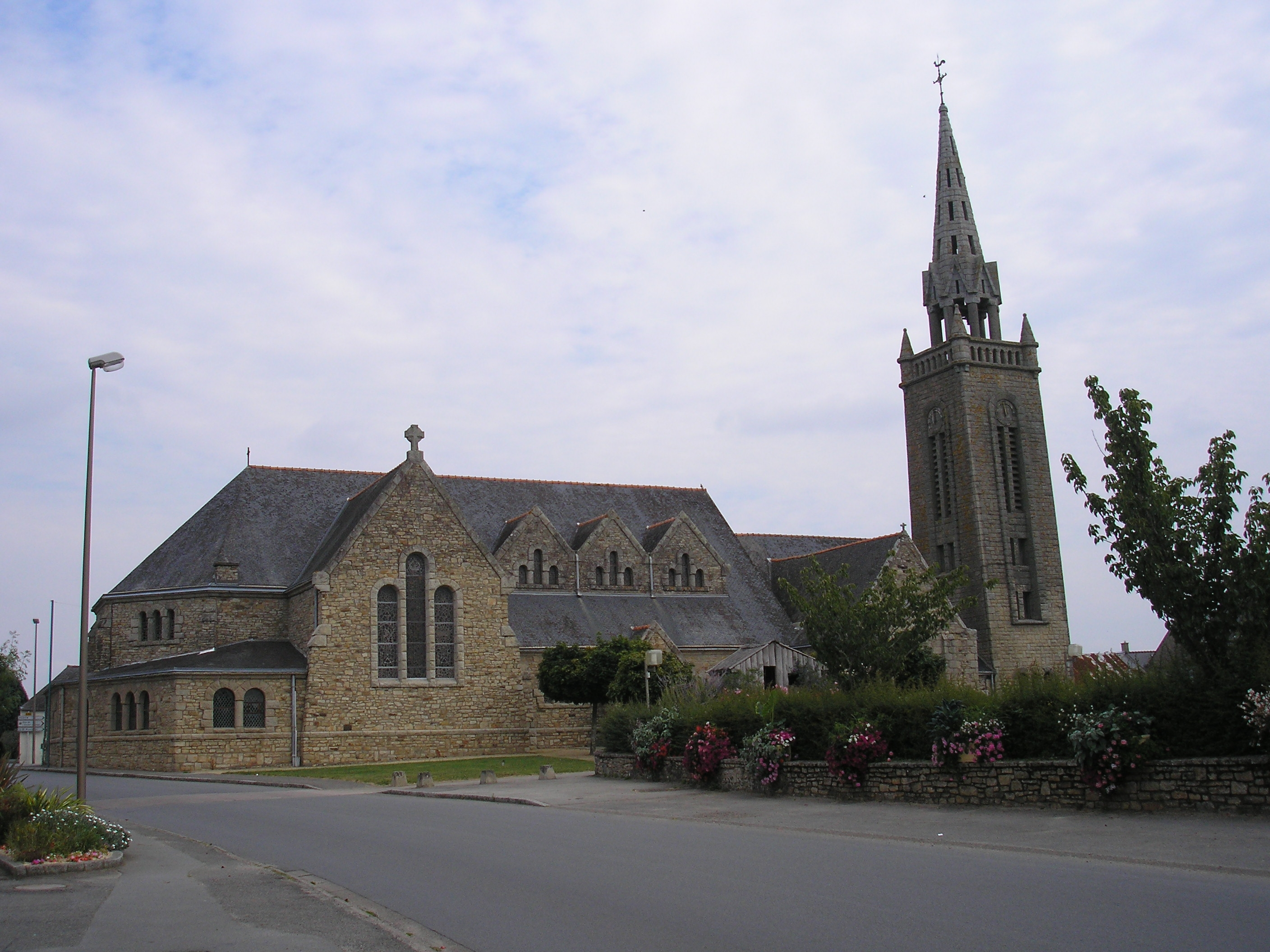 Rieux (Bretagne, France). Eglise Saint-Melaine.